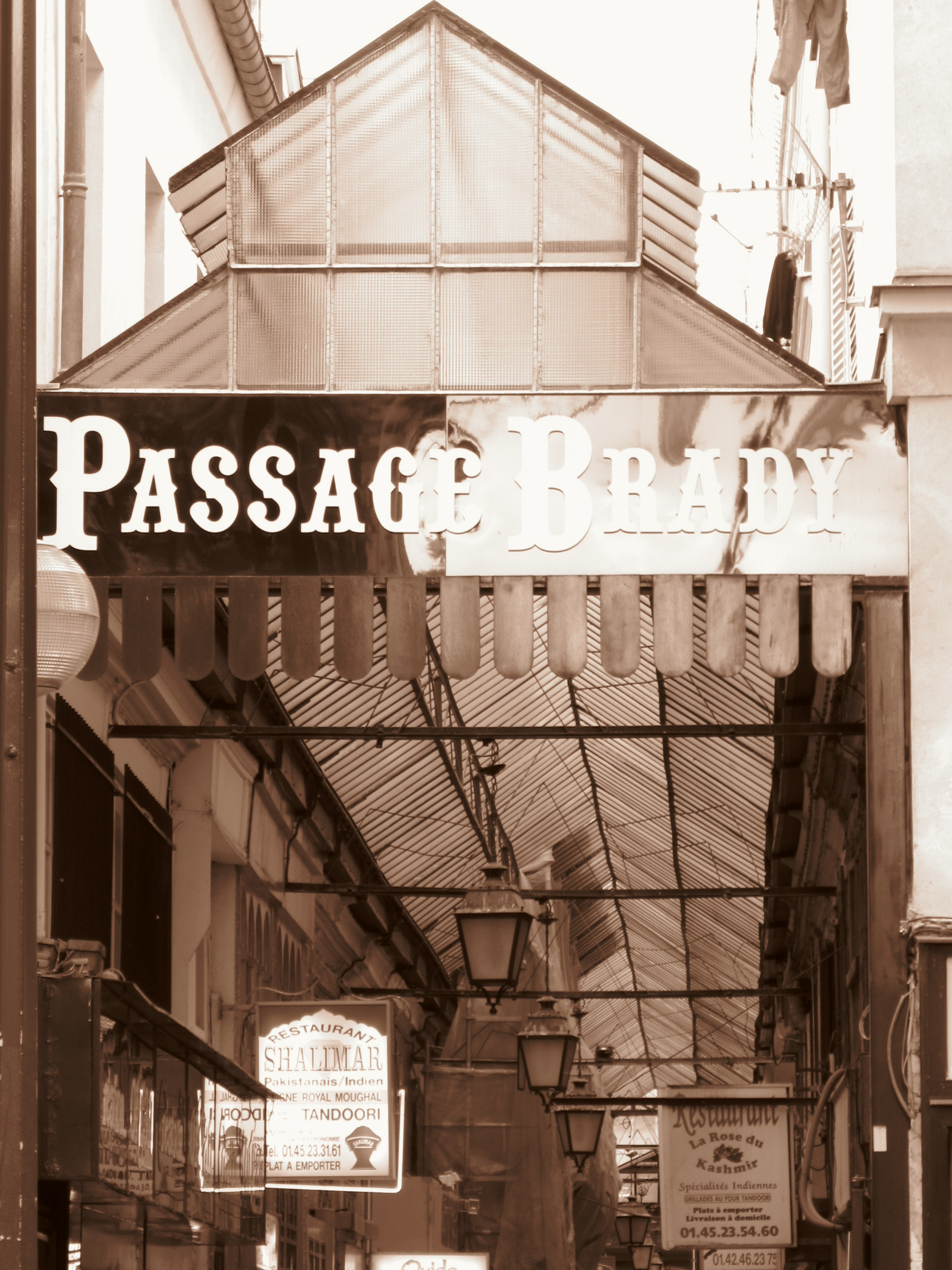 Le Passage Brady, du côté du Faubourg-Saint-Denis, et sa verrière. Passage du 33 boulevard de Strasbourg au 46 rue du Faubourg-Saint-Denis à Paris Xème, près du métro Château d'eau.